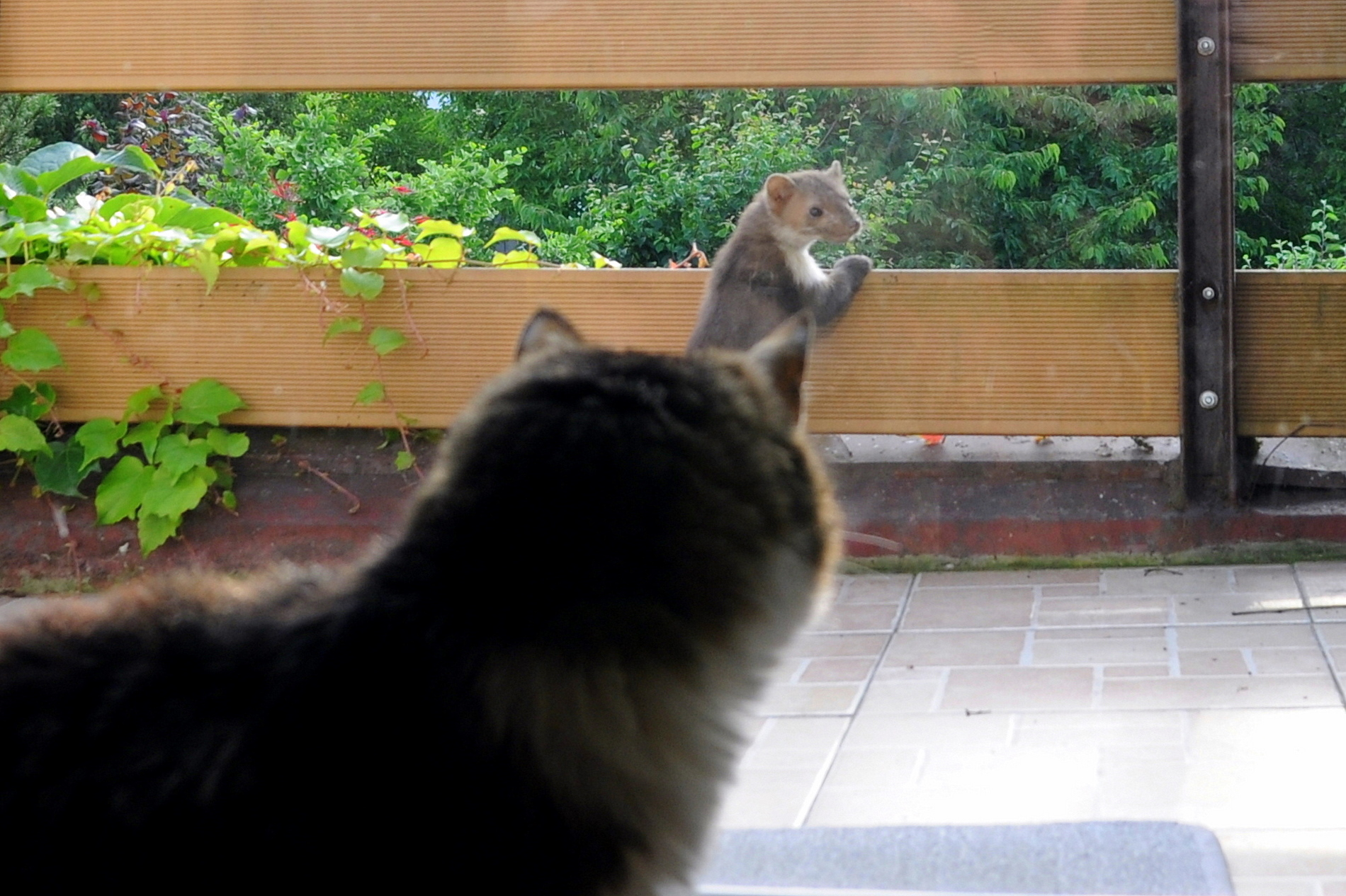 Kot domowy obserwuje kunę, która pojawiła się na balkonie.